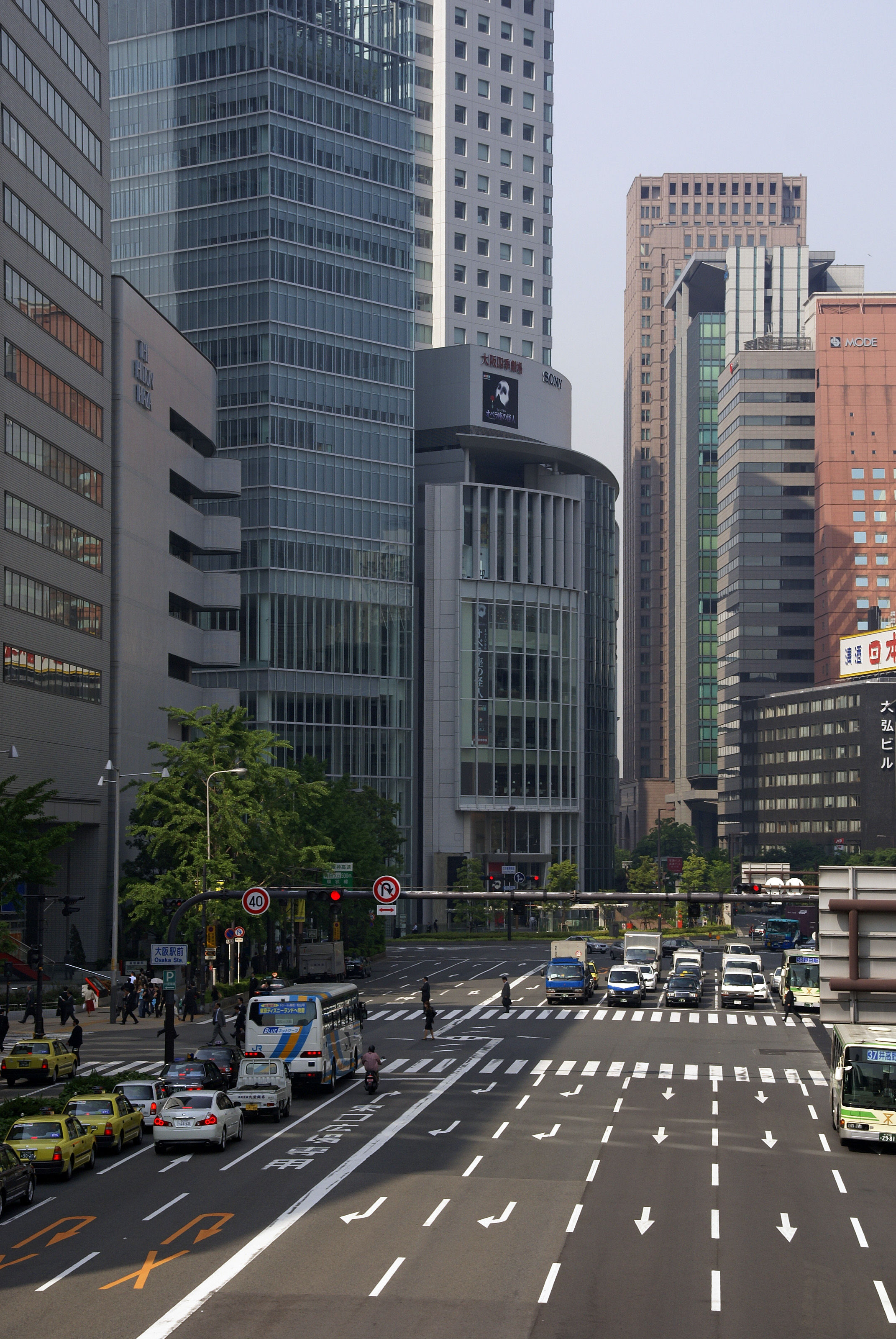 Umeda in Osaka, Japan